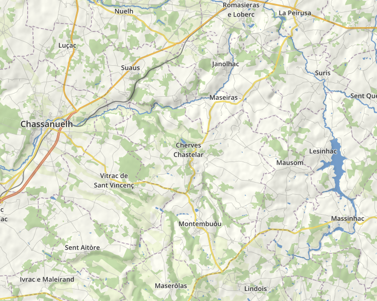 Mapa occitana de las comunas. Font: OpenStreetMap.